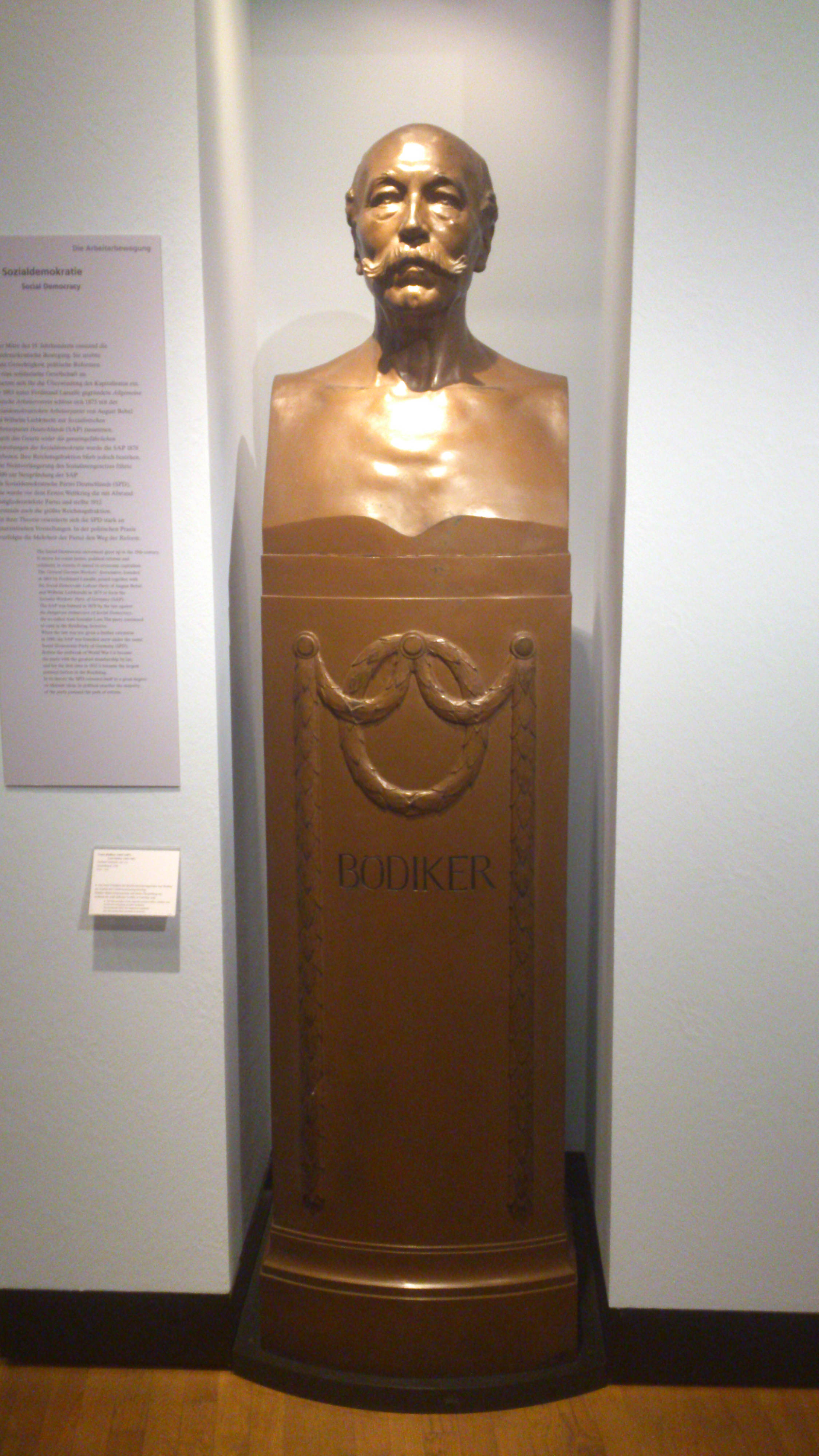 Tonio Bödiker (1843-1907) Büste mit Sockel in Eisen. Bildhauer: Gerhard Janensch (1860-1933). Deutschland 1910. Höhe 220 cm, Breite 54 cm, Tiefe 39 cm. Dauerausstellug, Deutsches Historisches Museum, Berlin. Als erster Präsident des Reichsversicherungsamtes war Bödier am Ausbau der Unfallversicherung beteiligt. Bödiker führte Schutznormen und deren Überprüfung ein, wodurch die Zahl der tödlichen Unfälle in Fabriken sank. Link